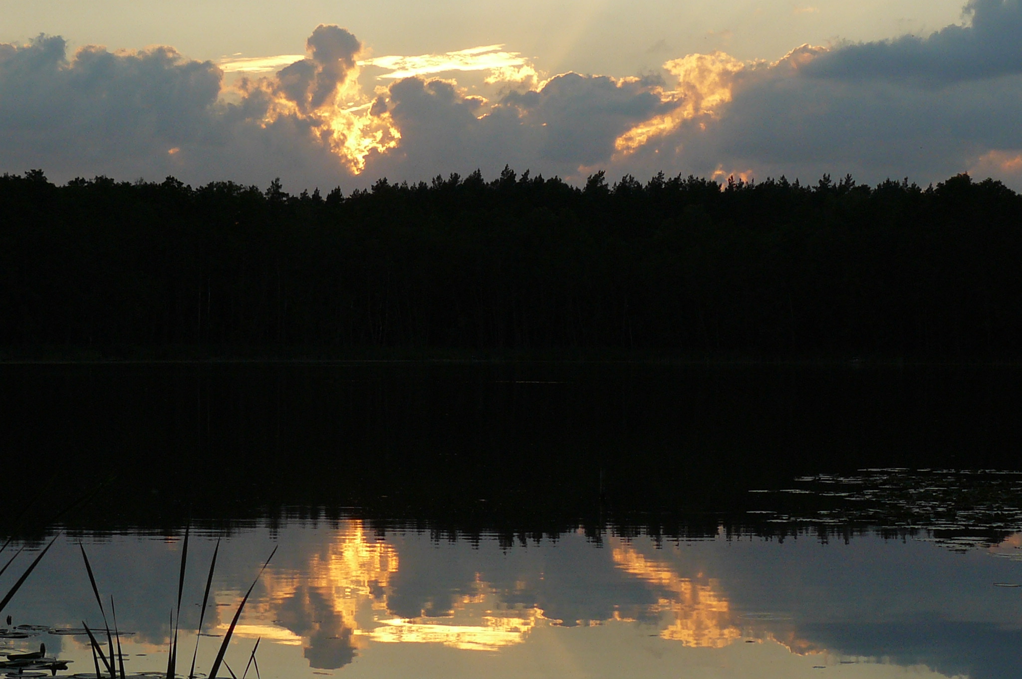 Jez. Jamertal koło Starogardu Gd.